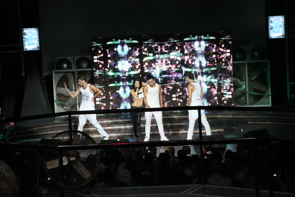 Inna at Club Ray, Kemer, Turkey (September 2009)